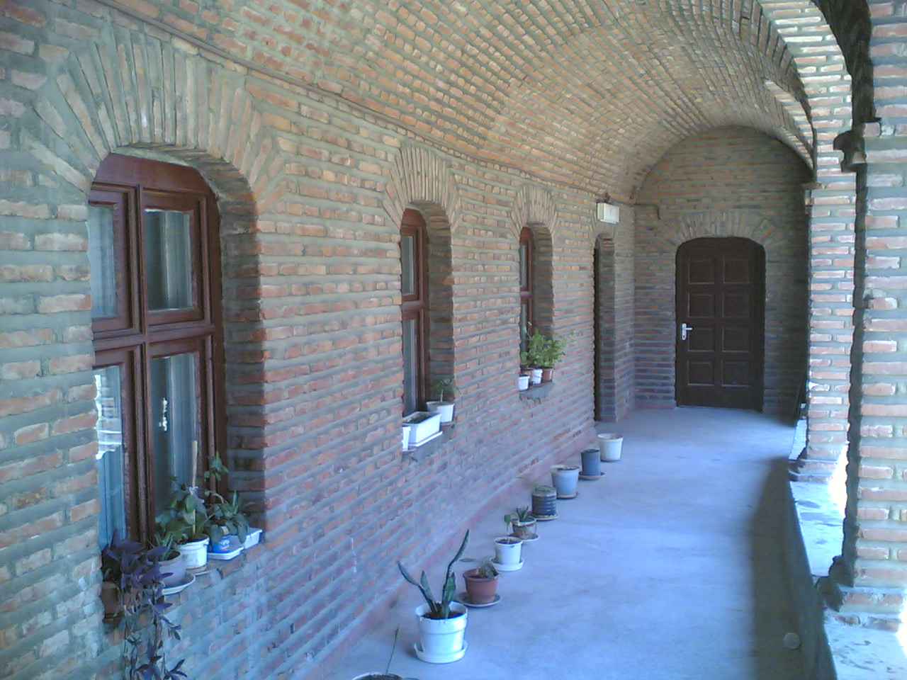 Mănăstirea Plumbuita. Fotografii făcute personal cu telefonul mobil. Prin aceasta renunţ explicit la drepturile de autor.